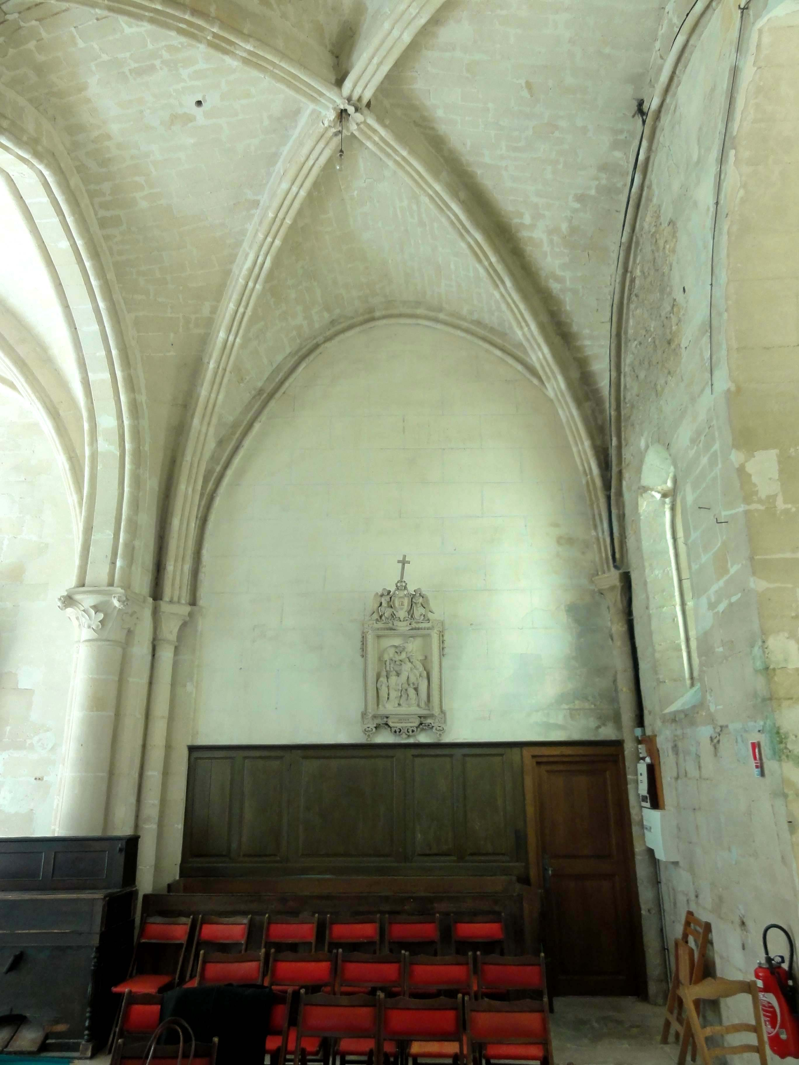 Intérieur de l'église - voir titre.